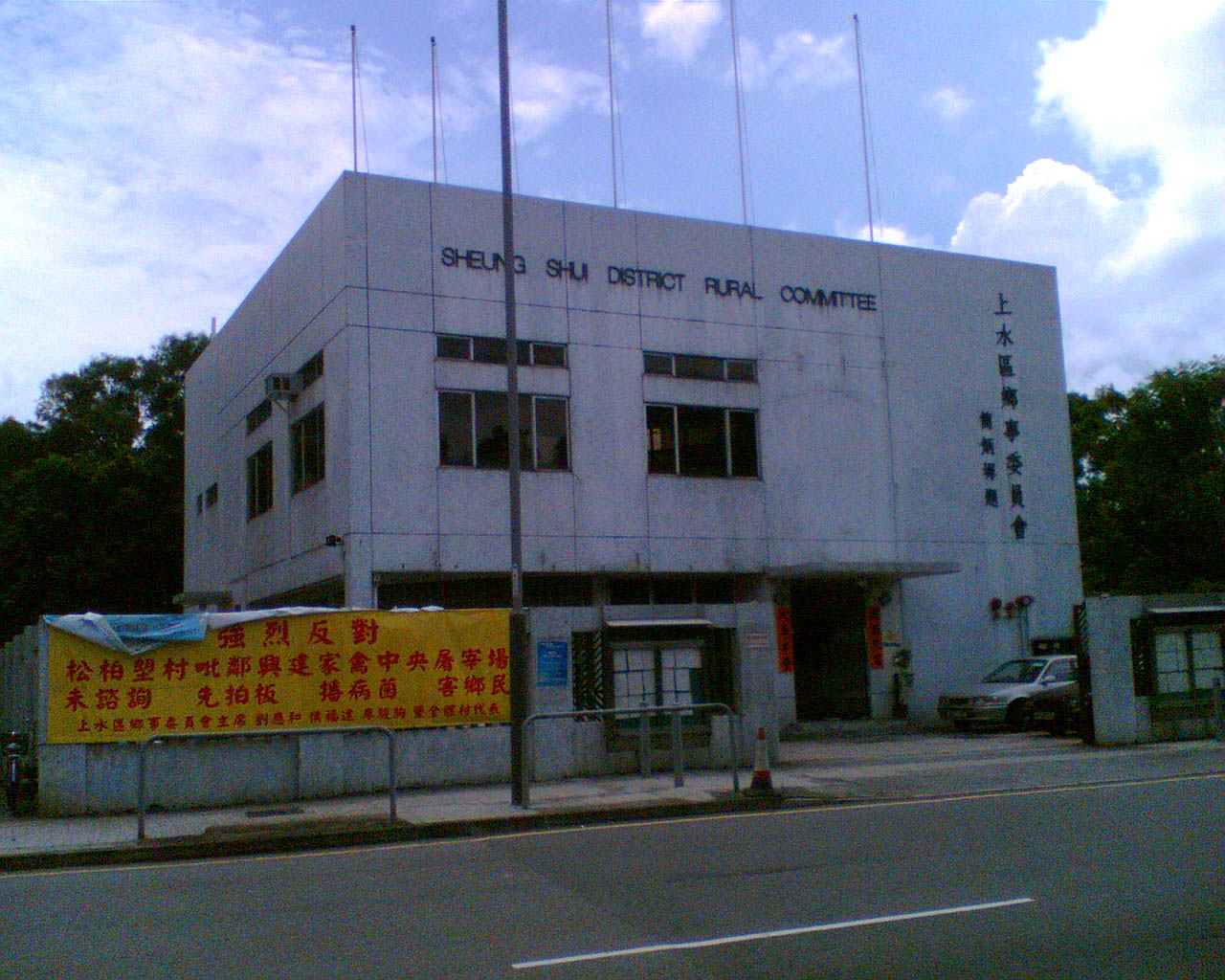 上水區鄉事委員會